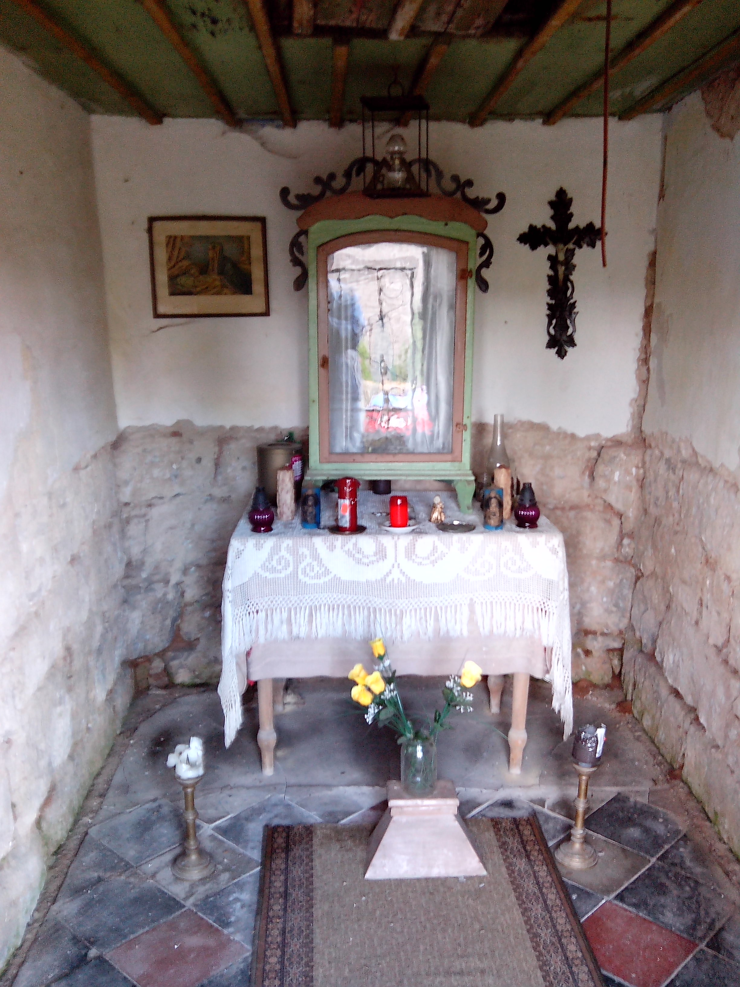 Mravenčí domky - kaple - interiér